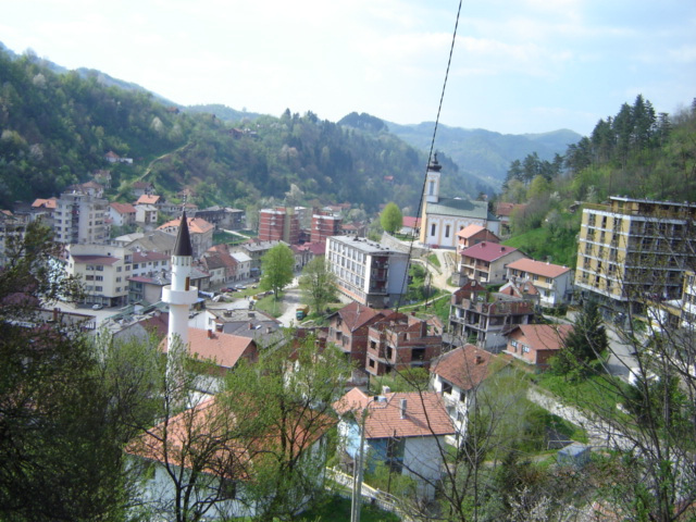 Srebrenica landscape